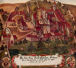 Ansicht von Elchingen im Jahre 1619 von elchingen.de